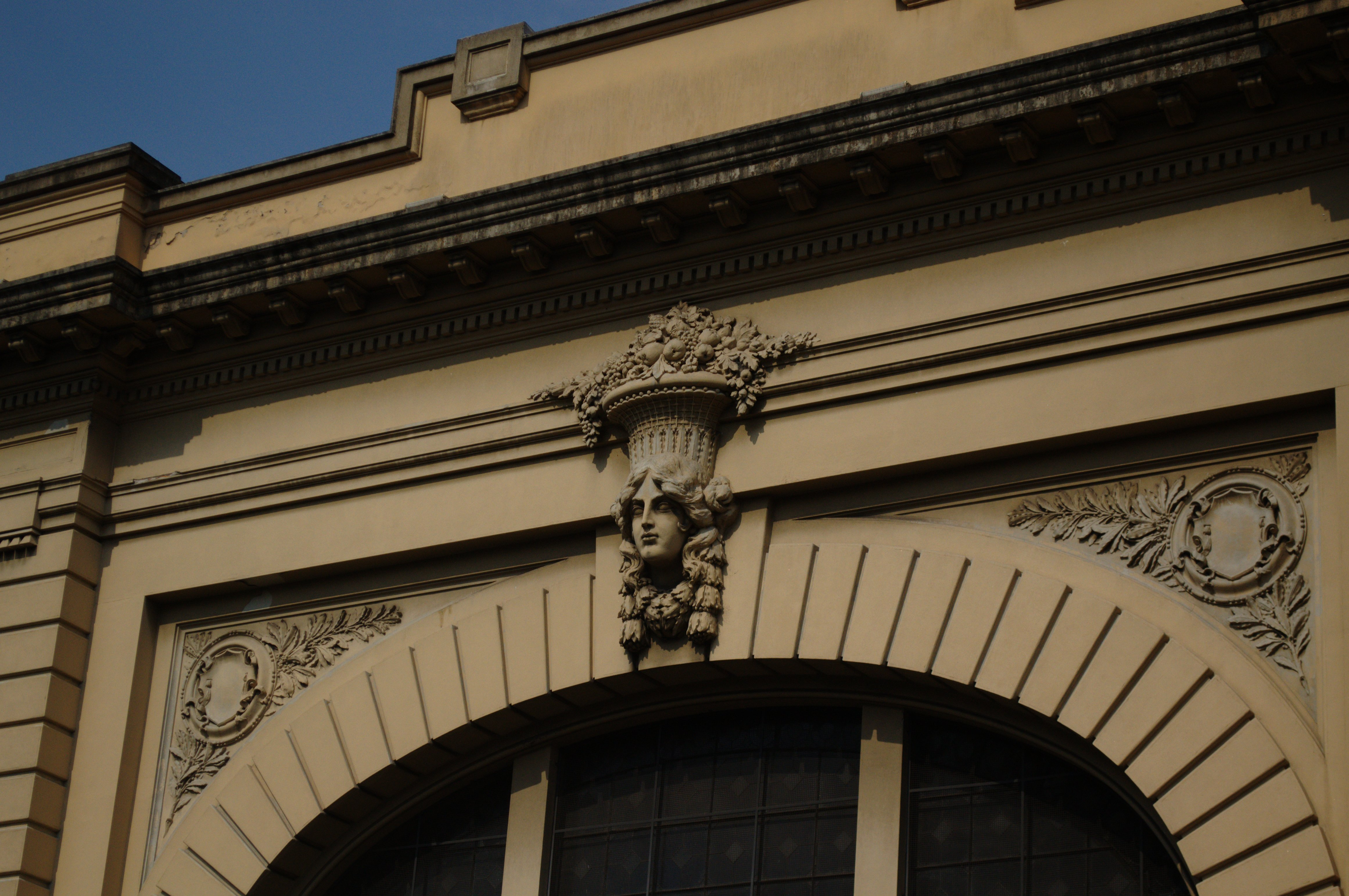 Detalhe da fachada do Mercado Municipal de São Paulo.